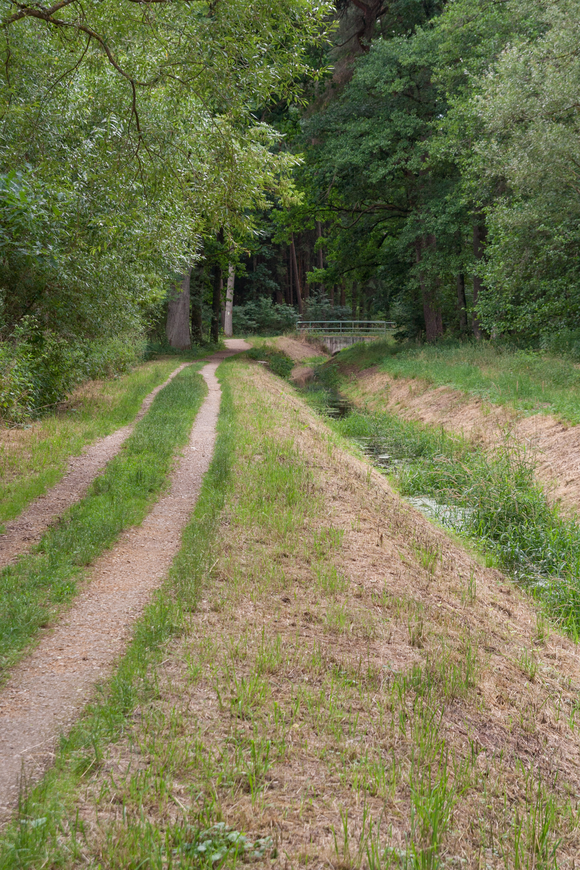 Ludwig-Donau-Main-Kanal, Gauchsbachleitgraben, Oberer Verlauf